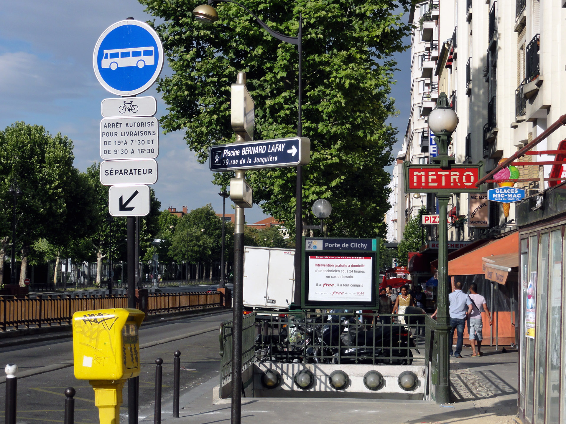 La station Porte de Clichy de la ligne 13 du métro de Paris, France